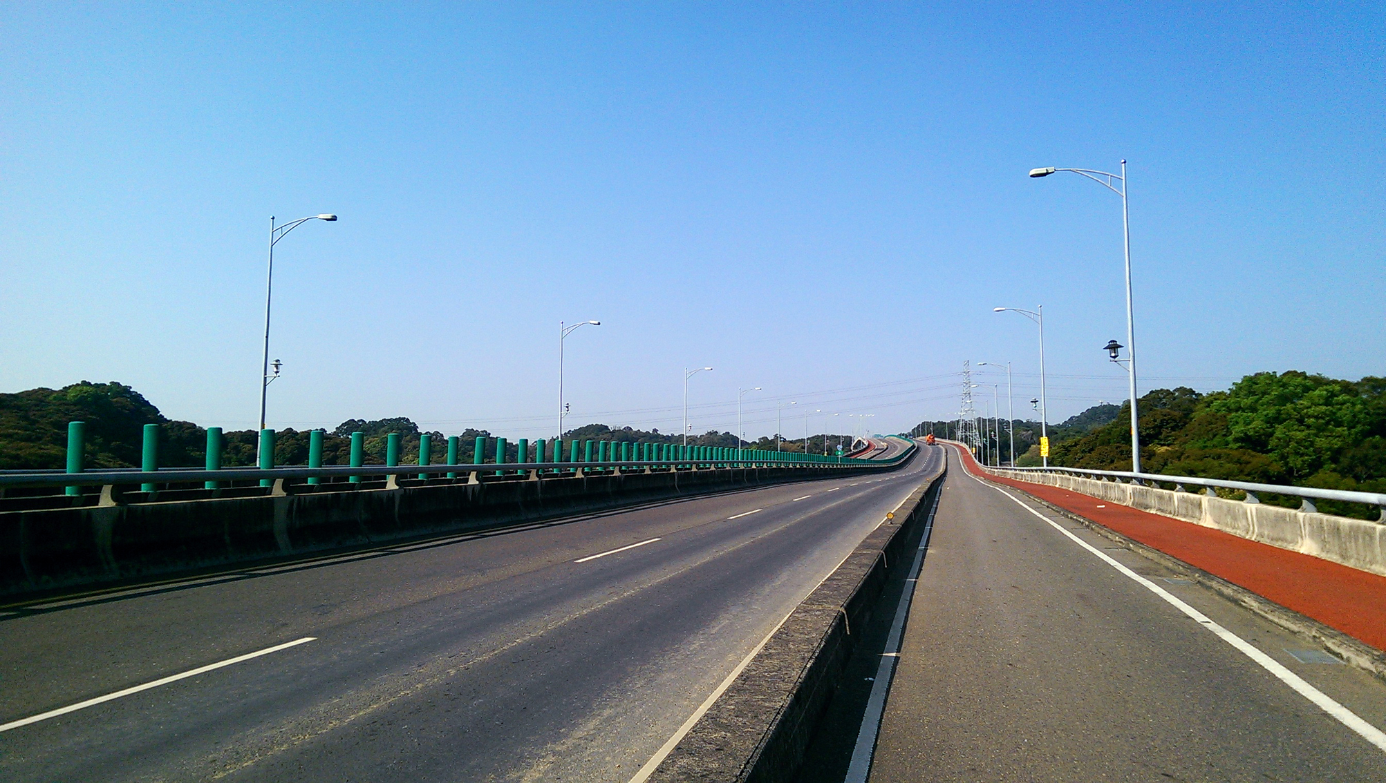 中文（台灣）: 台74甲線在花壇鄉行經八卦台地的路段